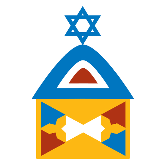 הלוגו של פורום ירוסלם